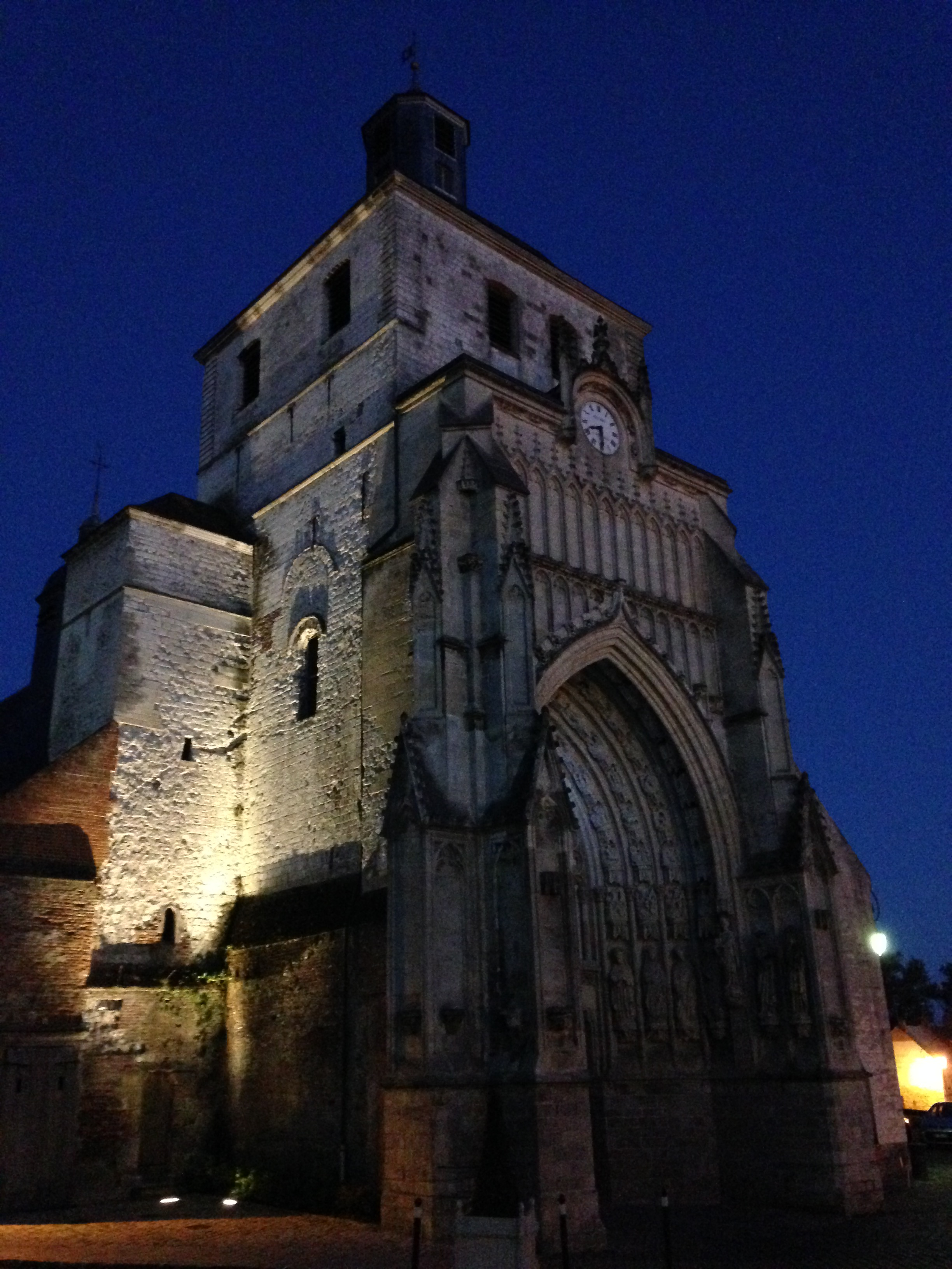 Abbatiale Saint-Saulve à la nuit tombée